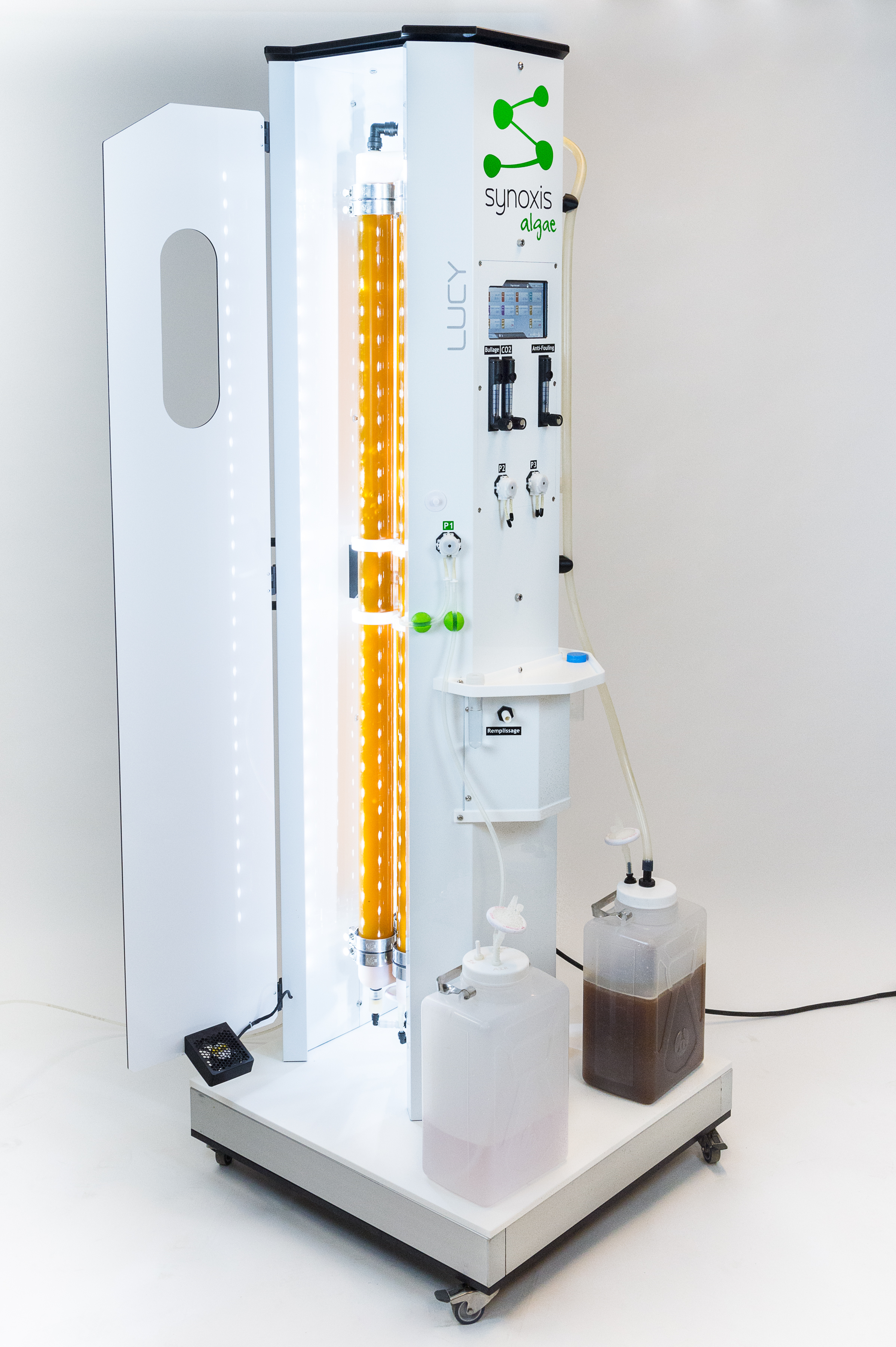 Photobioréacteur LUCY - Synoxis Algae